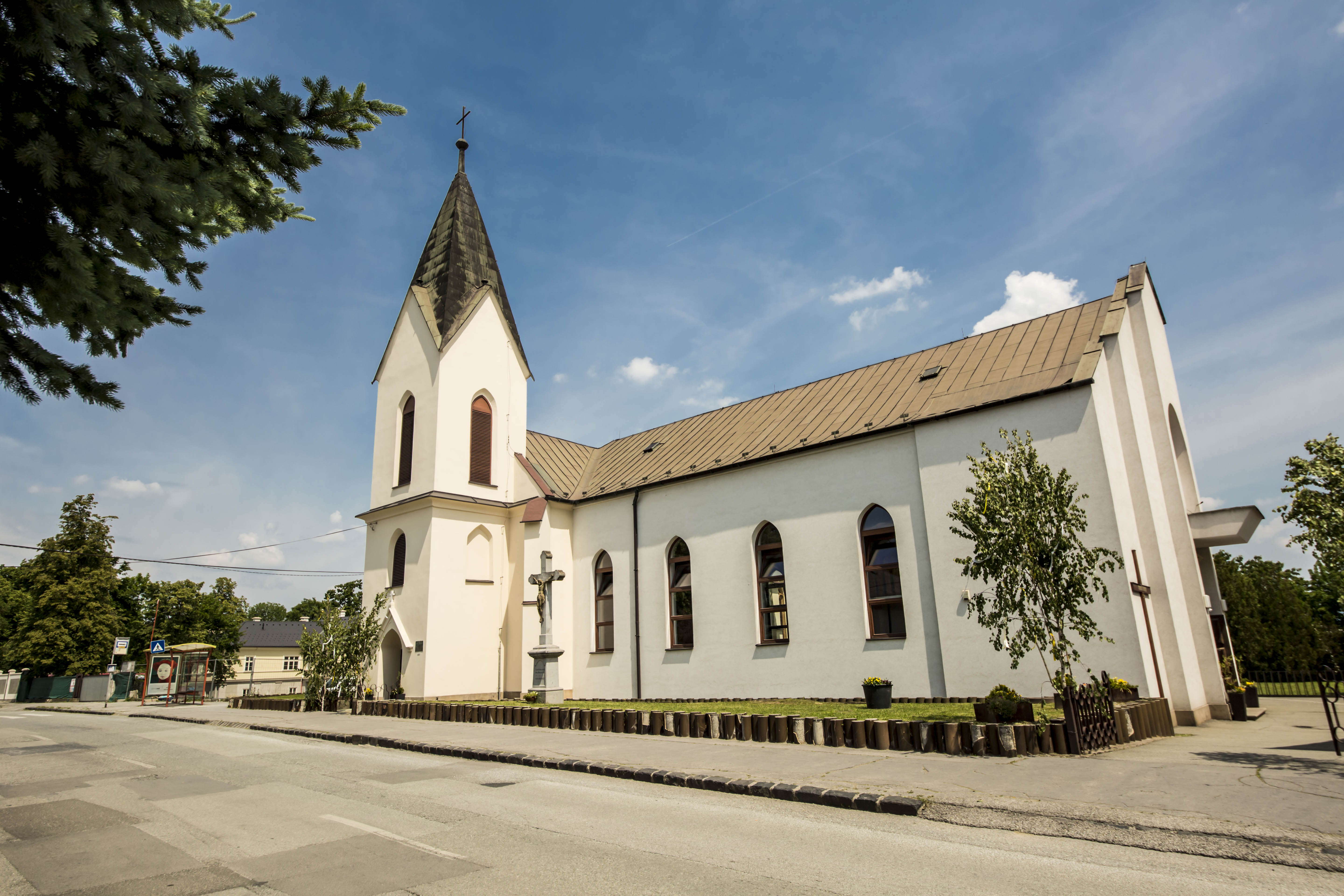 Kostol sv. Petra a Pavla_Barca